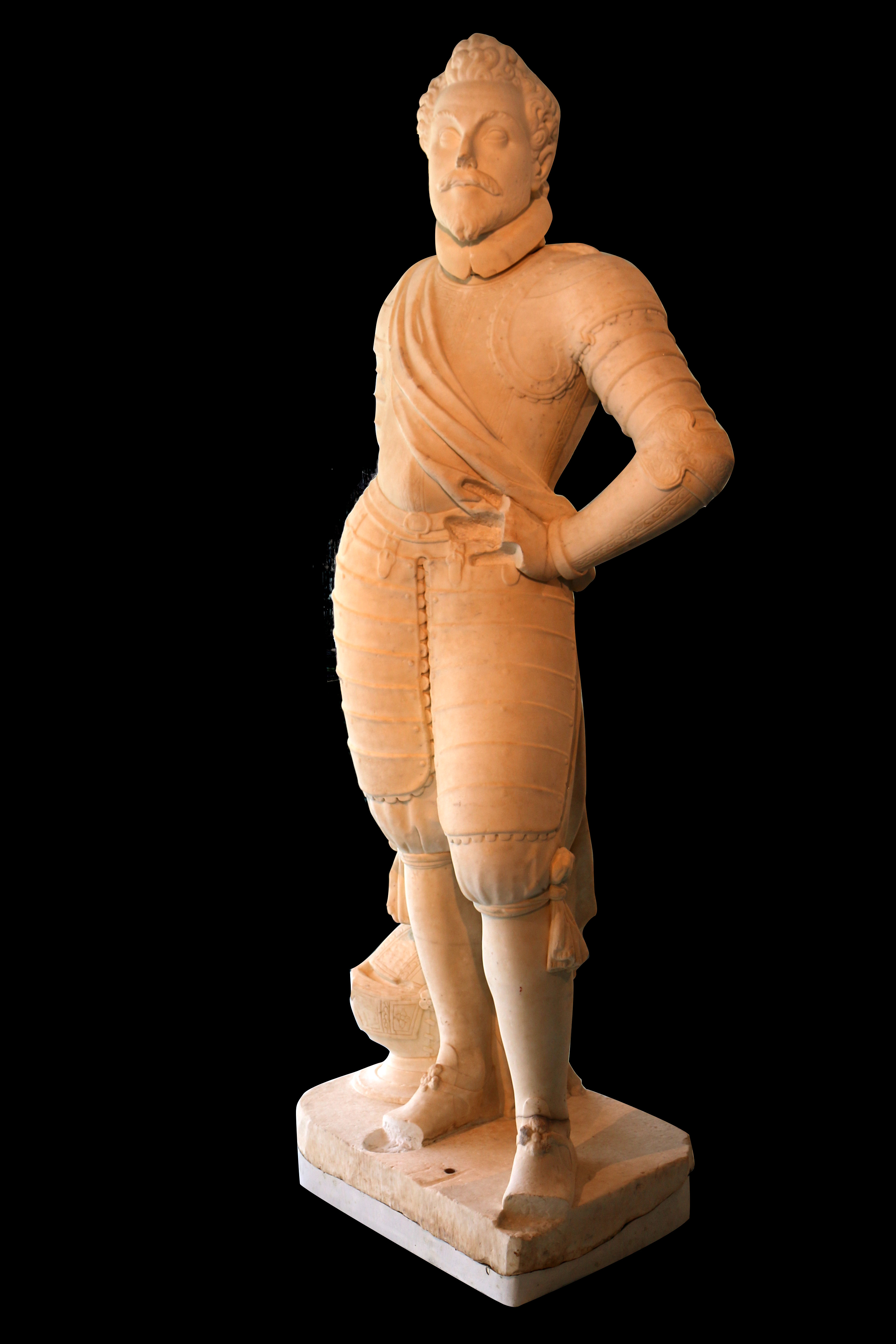 Statue en marbre représentant Pierre de Libertat (1562-1597) qui assassinat Charles de Casaulx . Musée d'histoire de Marseille au centre Bourse de la ville.